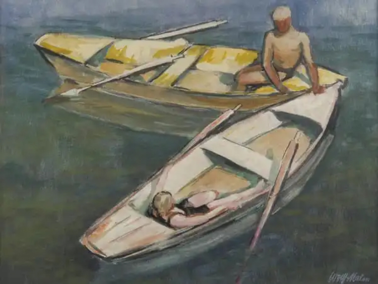 Ruderboote